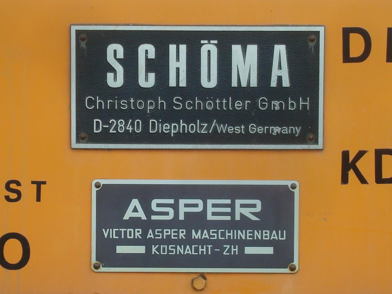 Fabrikschilder der Firma Schöma und Asper an der Rangierlokomotive Tm 237 906-3 Zabett der Firma Pesa